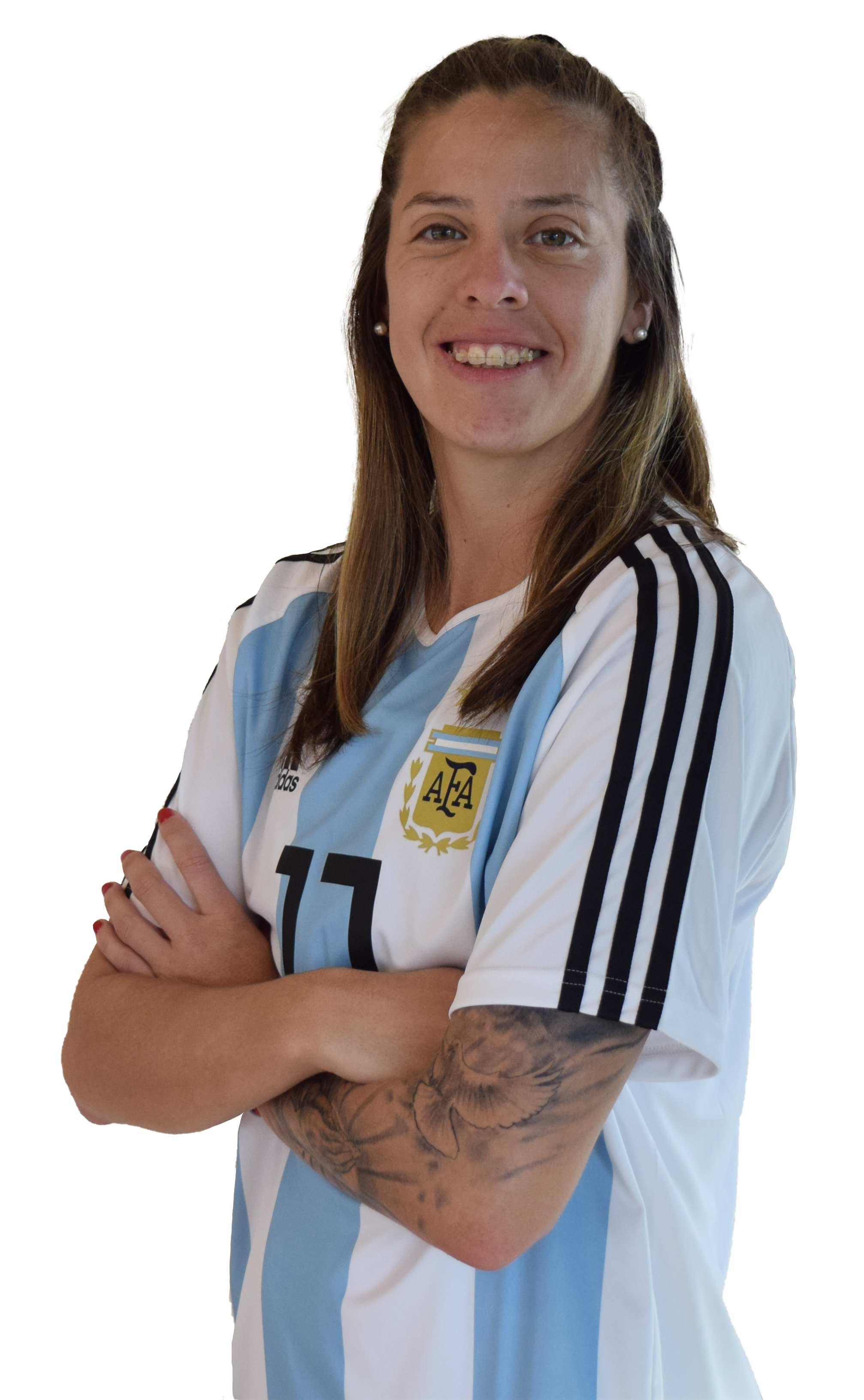 Linda Ruth Bravo, jugadora de la selección mayor femenina de fútbol de Argentina.Foto sacada previo al primer partido del repechaje por un lugar para el mundial de futbol femenino de Francia 2019